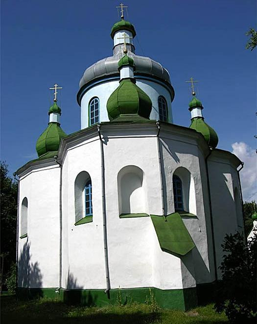 Свято-Миколаївська_церква_в_Олевську.jpg: Свято-Миколаївська церква у центрі міста Олевська (райцентр Житомирської області)